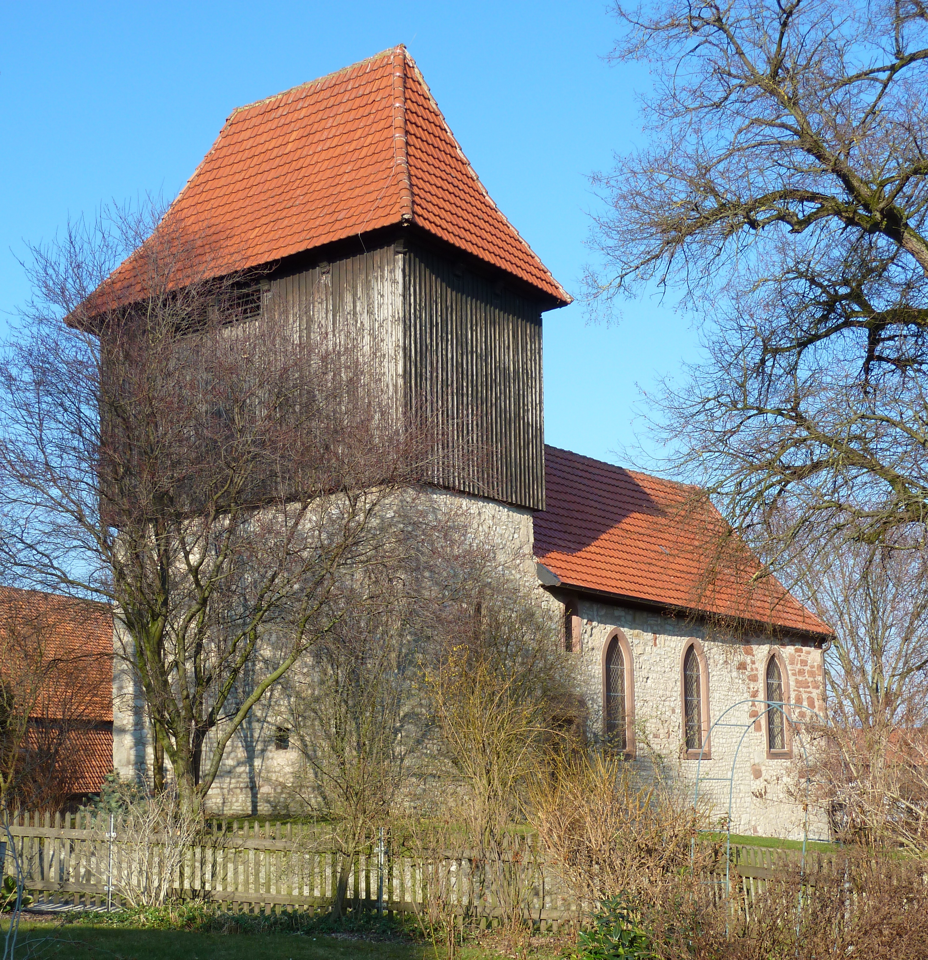 Evangelisch-lutherische Kirche St. Jakobus d. Ältere in Eboldshausen, Gemeinde Kalefeld, Landkreis Northeim. Kalkbruchsteinbau 12.–15. Jahrhundert, Portal und Inneneinrichtung 1848.